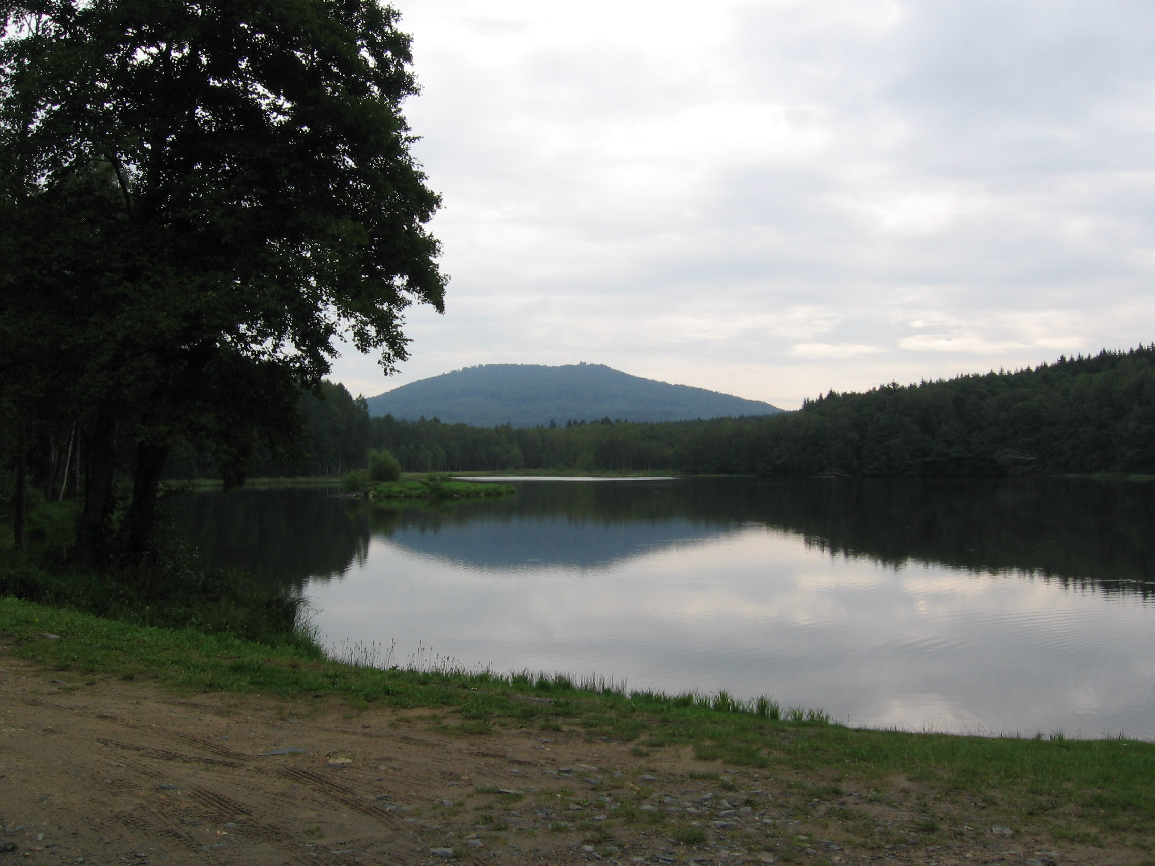 Přimda, Václavský rybník, pohled přes Mílov na vrch Přimda.